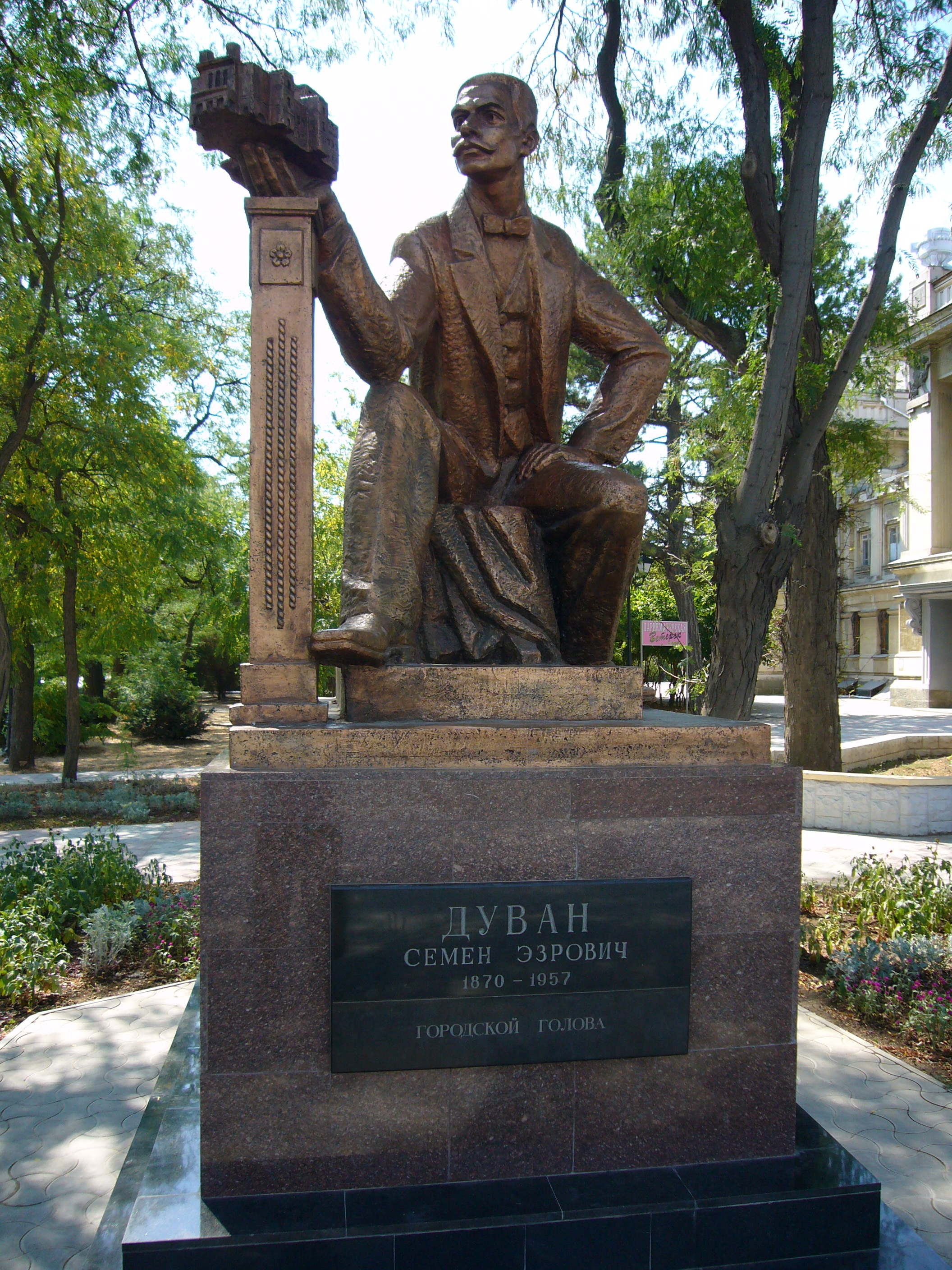 A monument to Semen Ezra Duvan, Mayor of Eupatoria, Crimea in early 20th century. Teatralnaya Ploshchad (Theatre Square), Eupatoria, Crimea, Ukraine. S. Duvan holds in his hand a miniature Eupatoria city theatre building. Памятник С.Э. Дувану, Городскому голове Евпатории в начале ХХ века. Театральная площадь, Евпатория, АР Крым, Украина. В руках у С.Э. Дувана макет городского театра Евпатории.